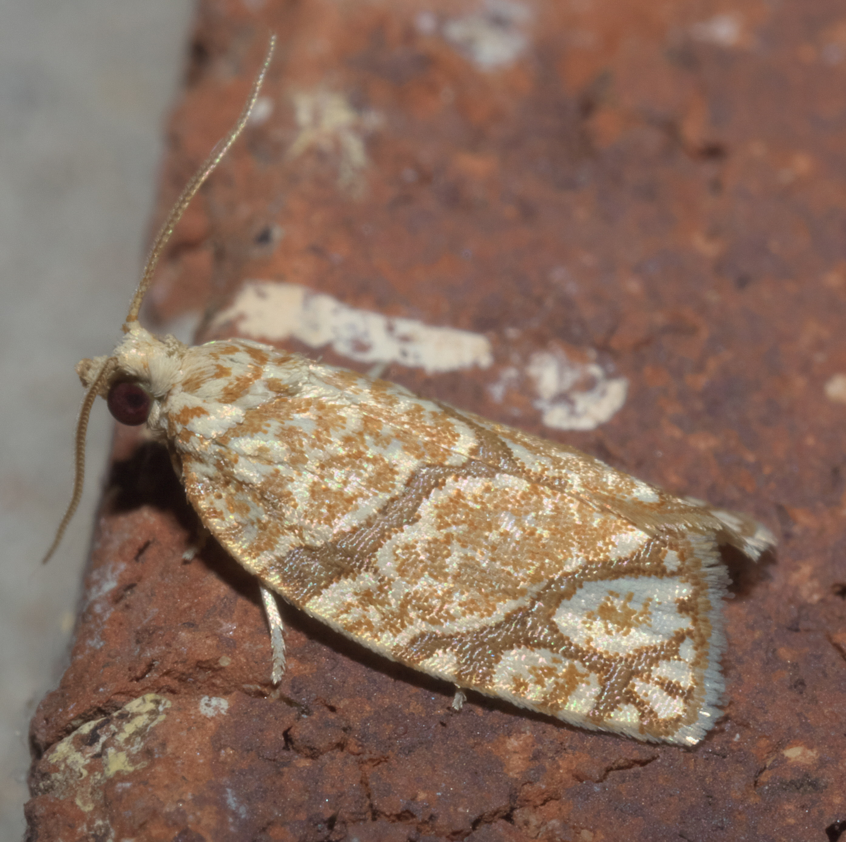 Argyrotaenia quercifoliana, oak leafroller, Size: 8.8 mm, ID Confidence: 90